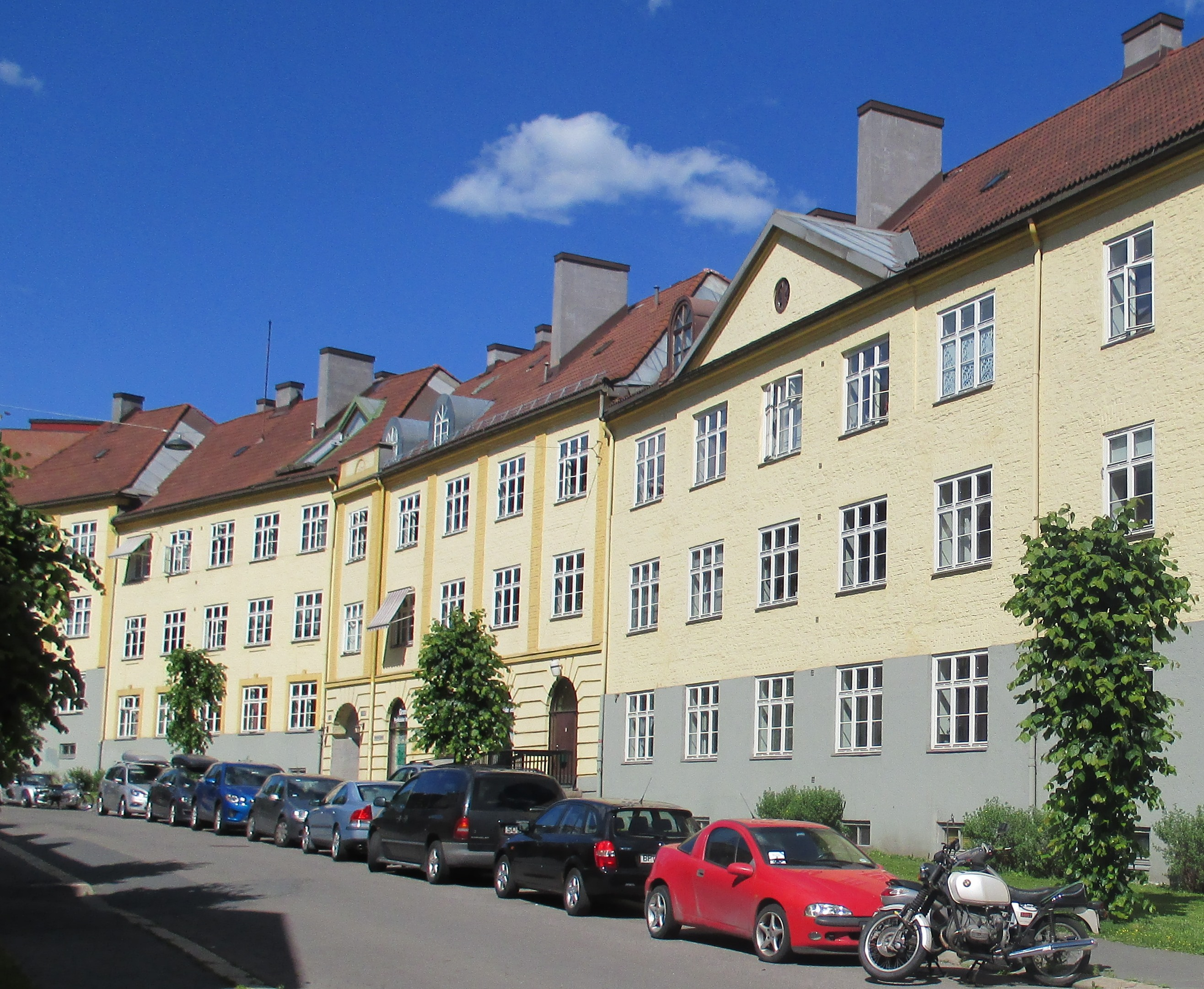 Lilleborggata på Torshov i Oslo